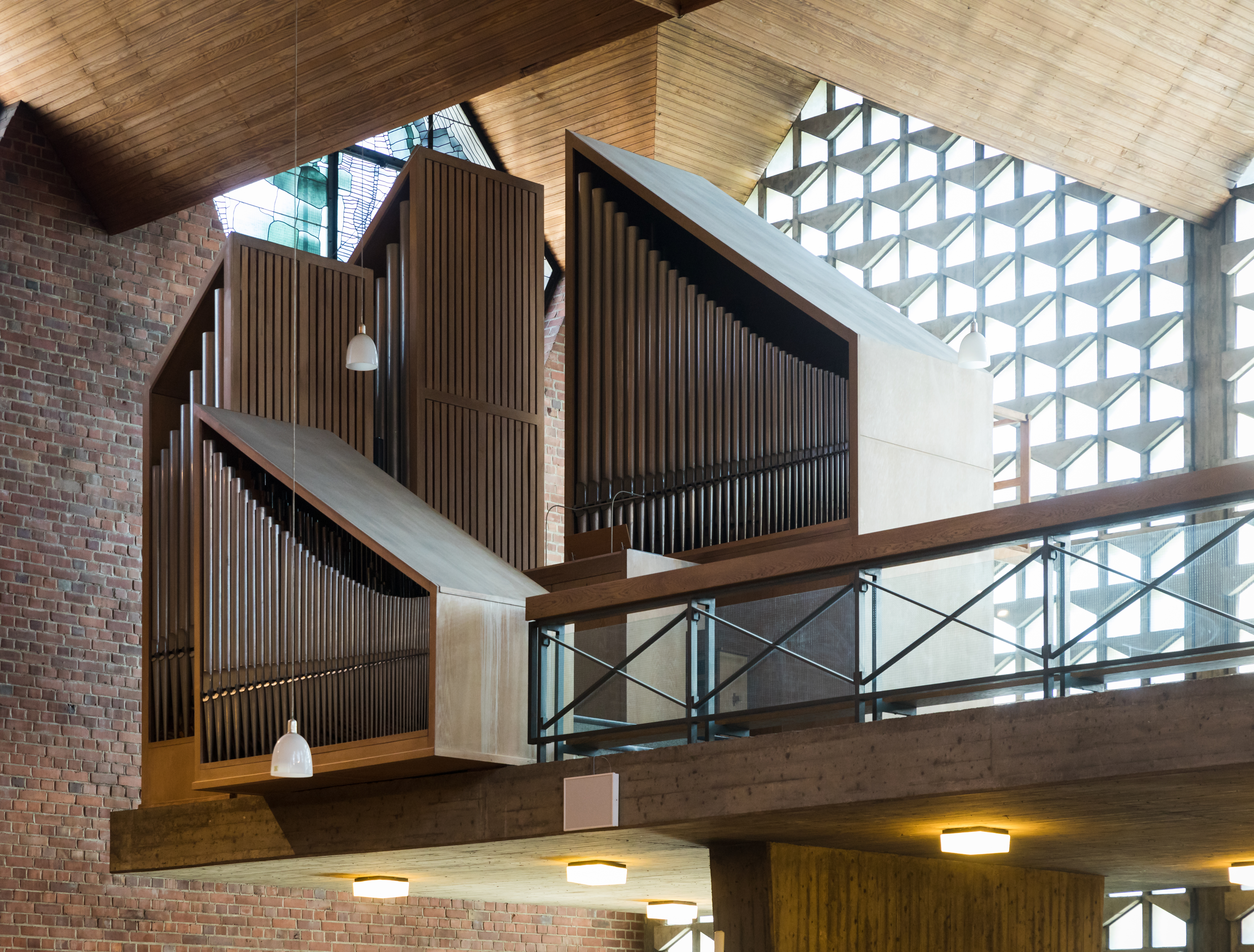 St. Clemens, Köln-Niehl, Architekt: Karl Band